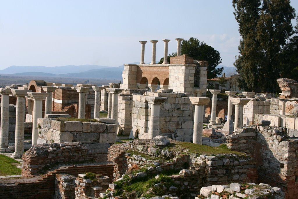 Selçuk, İzmir, Turkey